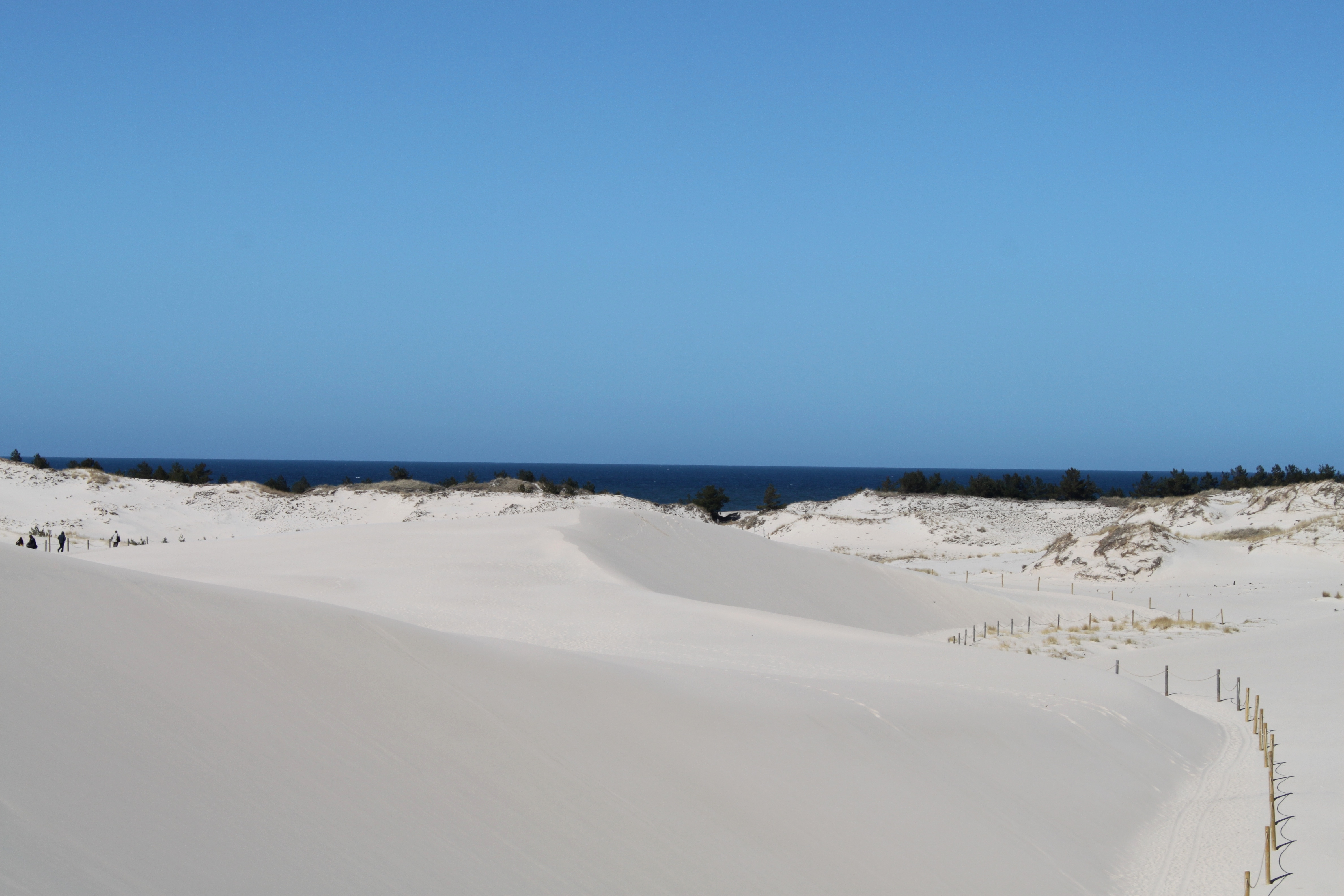 Specjalny obszar ochrony siedlisk Ostoja Słowińska. This is a photography of Natura 2000 protected area with ID PLH220023